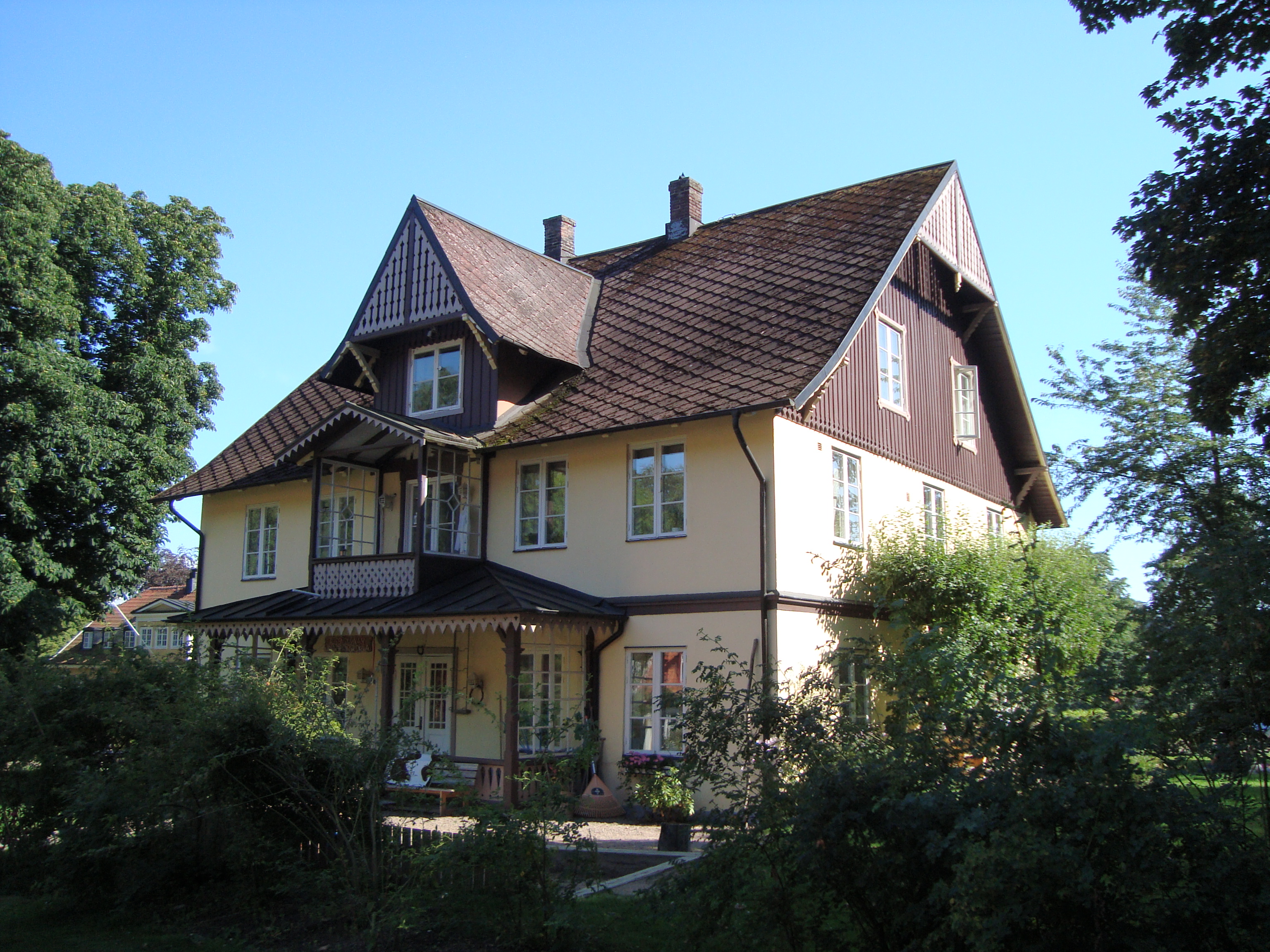 Kamrersvillan i Ramlösa brunnspark i Helsingborg.